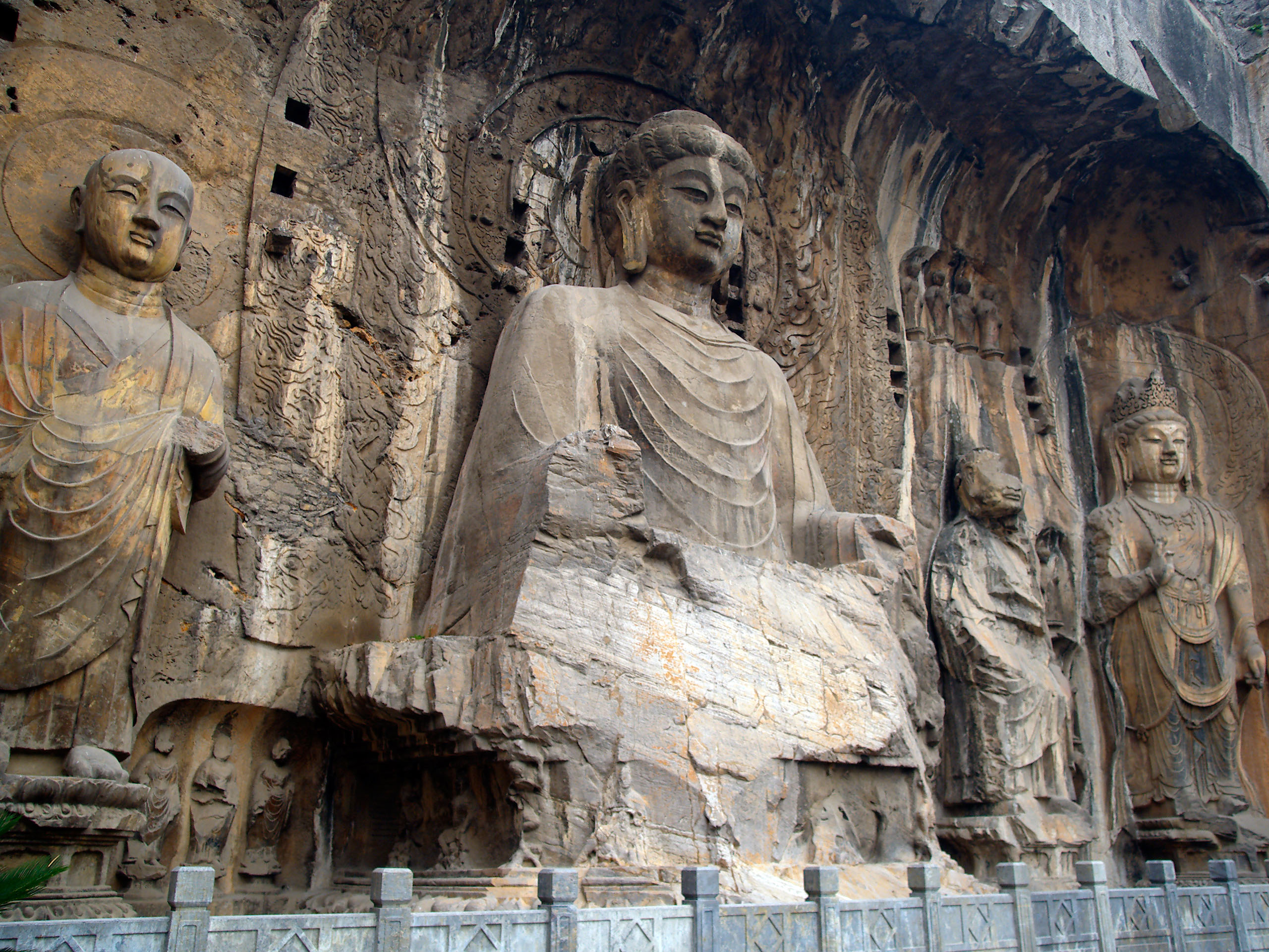 龍門盧舍那大佛和菩蕯羅漢像